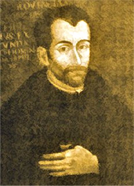 António de Andrade, jesuíta Português